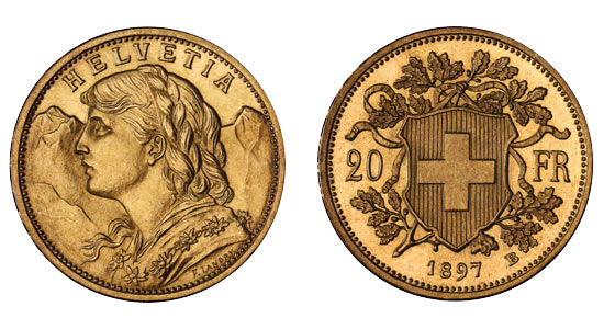 20 CHF Vreneli Pattern 1897